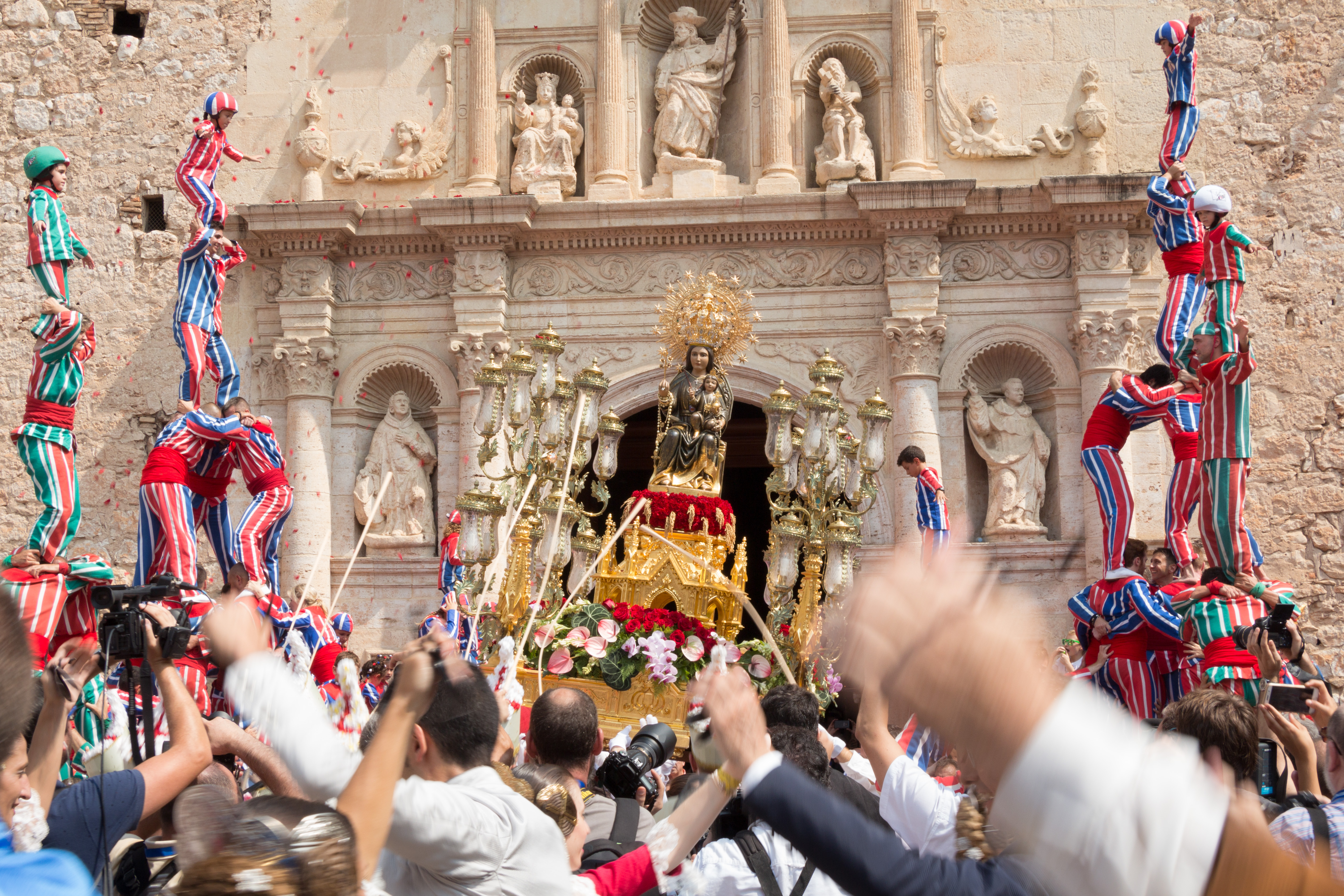 La Processoneta del Matí finaliza con un momento de actividad frenética mientras la Mare de Déu de la Salut entra en la basílica y los diferentes grupos realizan sus danzas. This is a photography of a Folklore festival in Spain (Wikidata id Q3290365).